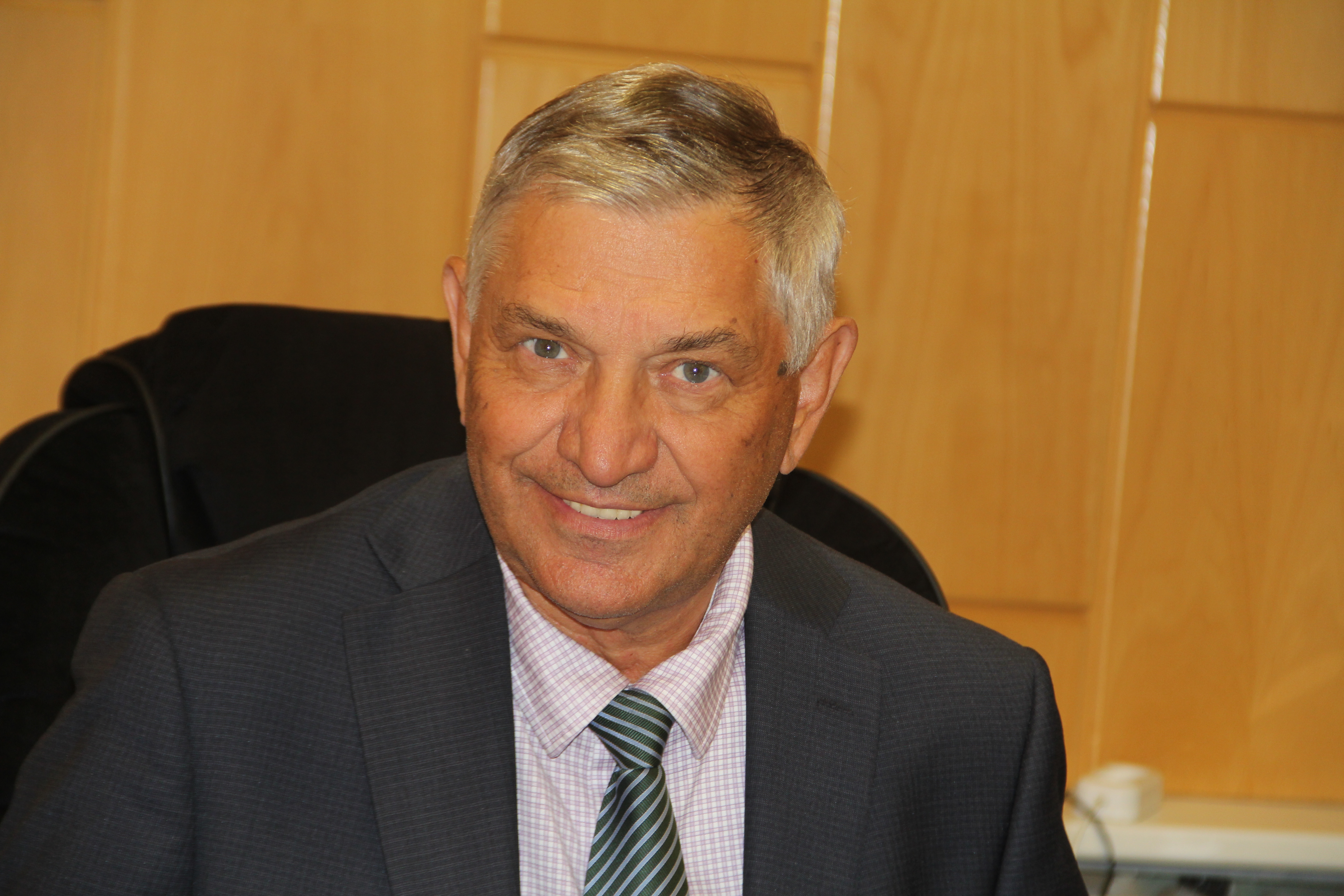 Директор ОАО "ВНИИНМ" с 2013 года